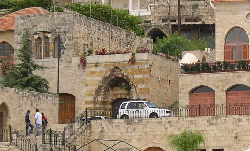 Deir Al Kamar synagogue